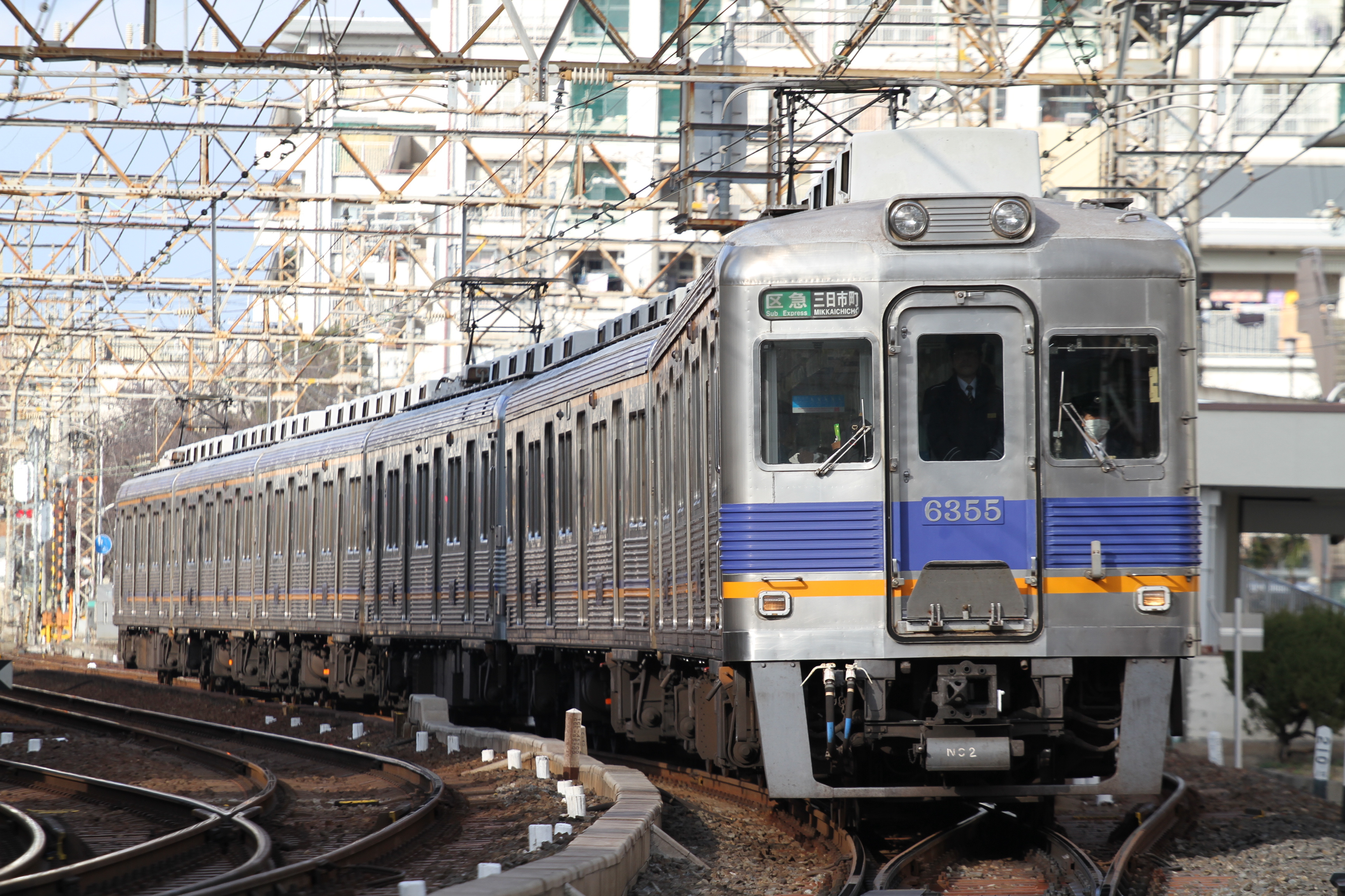 南海6300系 6355編成